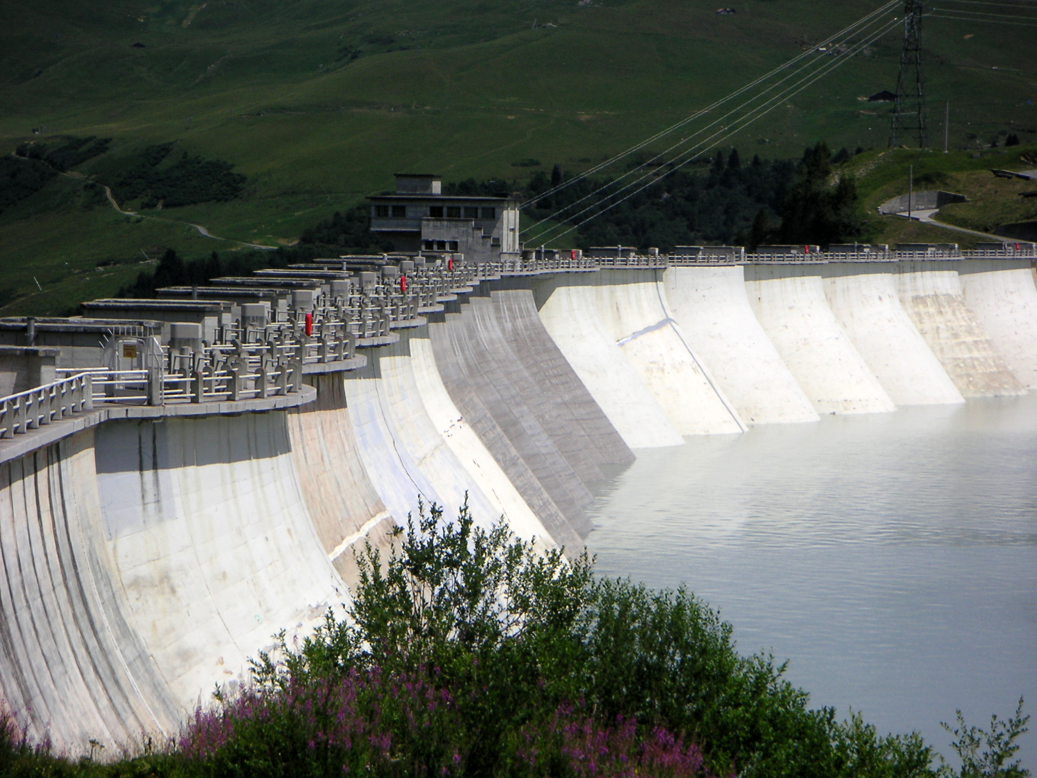 Le Barrage de la Girotte est un barrage français à voûtes multiples, situé dans le Beaufortain (Savoie), près du village d'Hauteluce.